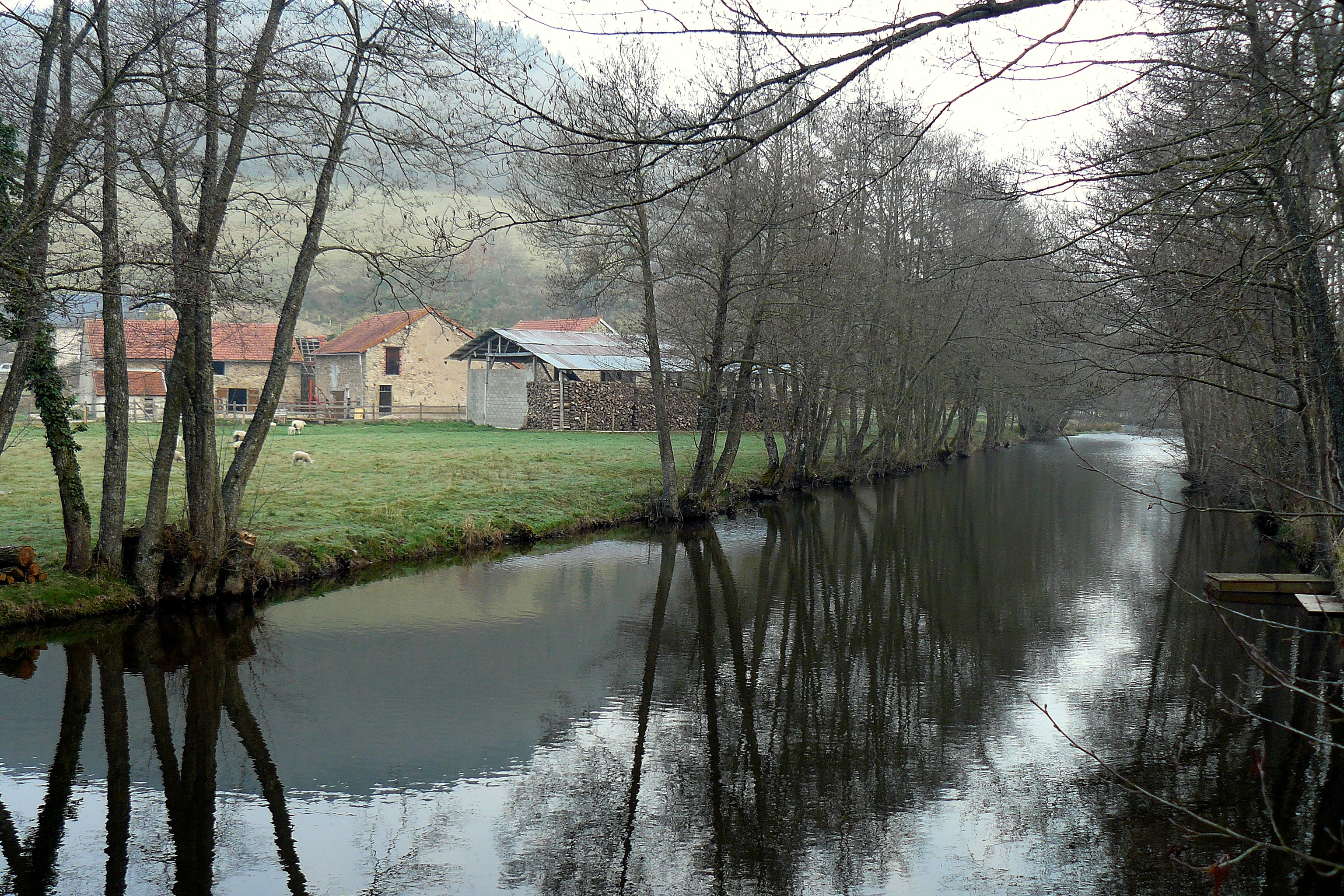 La rivière Ternin près de Lucenay-l'Evêque (Saône-et-Loire, France)